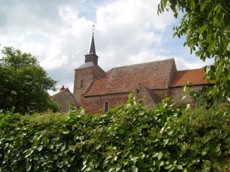 Vesdun kyrka